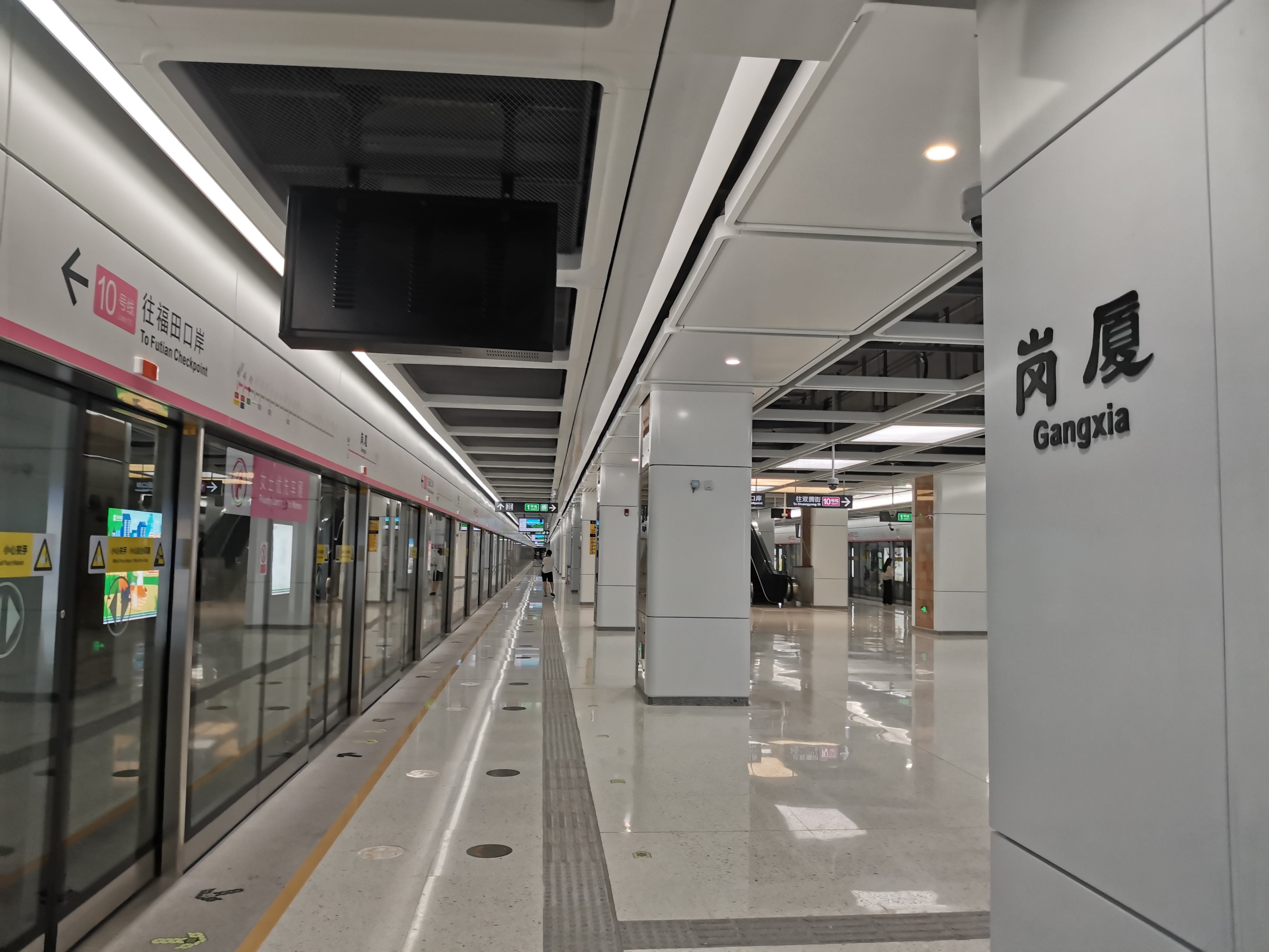 深圳地铁10号线岗厦站月台